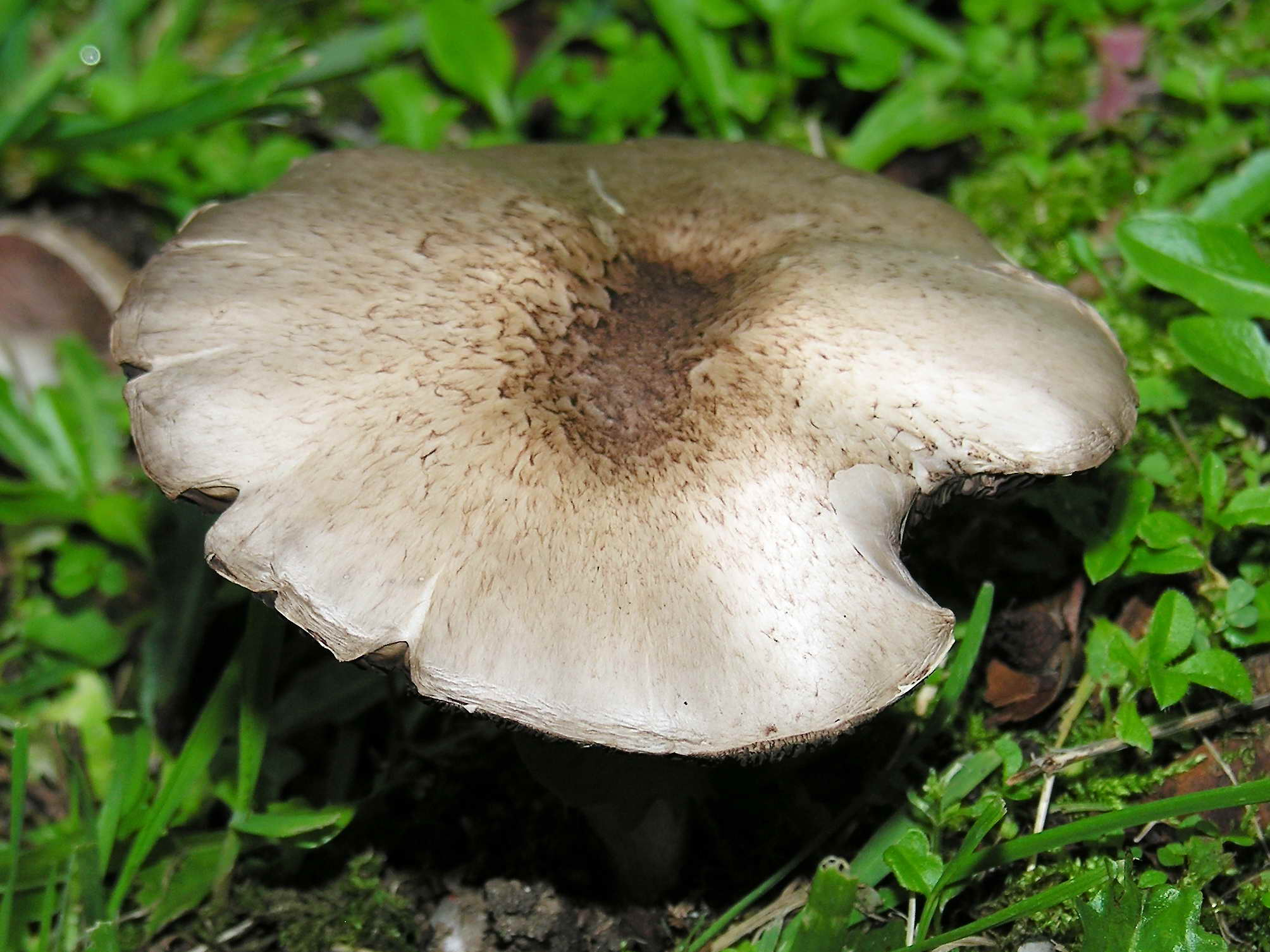 self made.